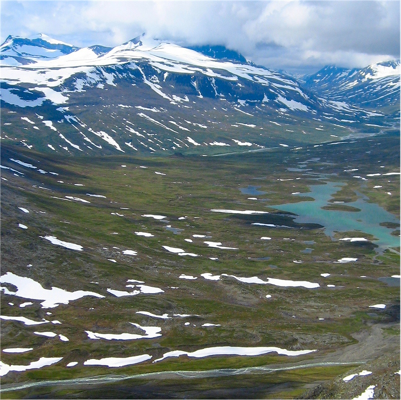 Pielavalta from halfway up Pierikpakte